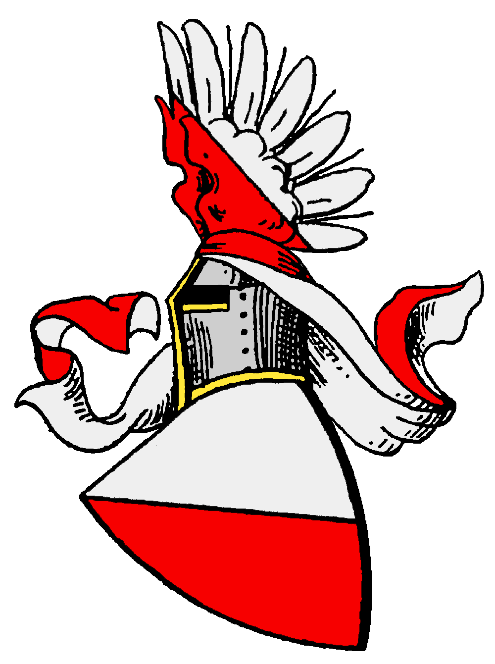 Wappen der Kraiger von Kraig